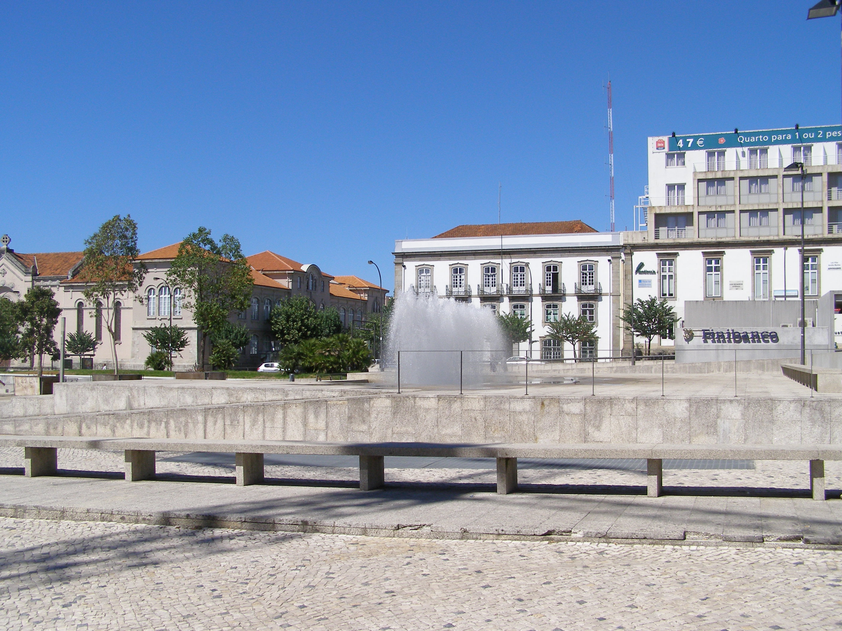 Praça Conde de Agrolongo (antigamente/formerly Campo da Vinha), Braga, Portugal.